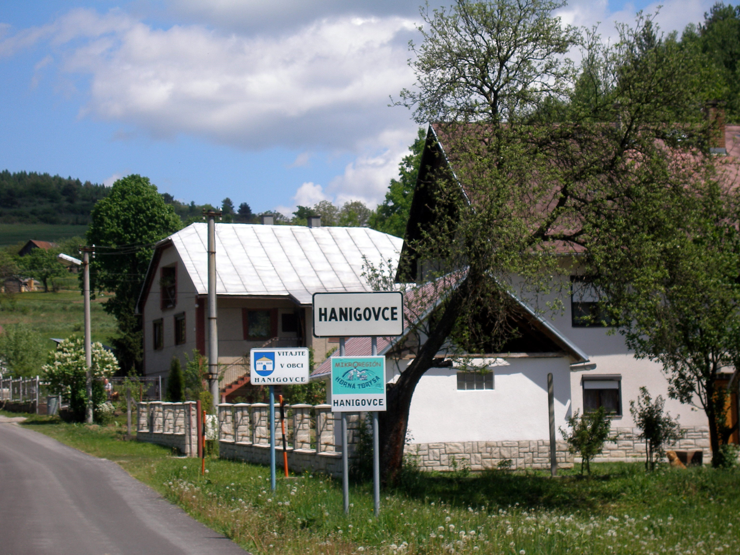 Obec Hanigovce okres Sabinov.